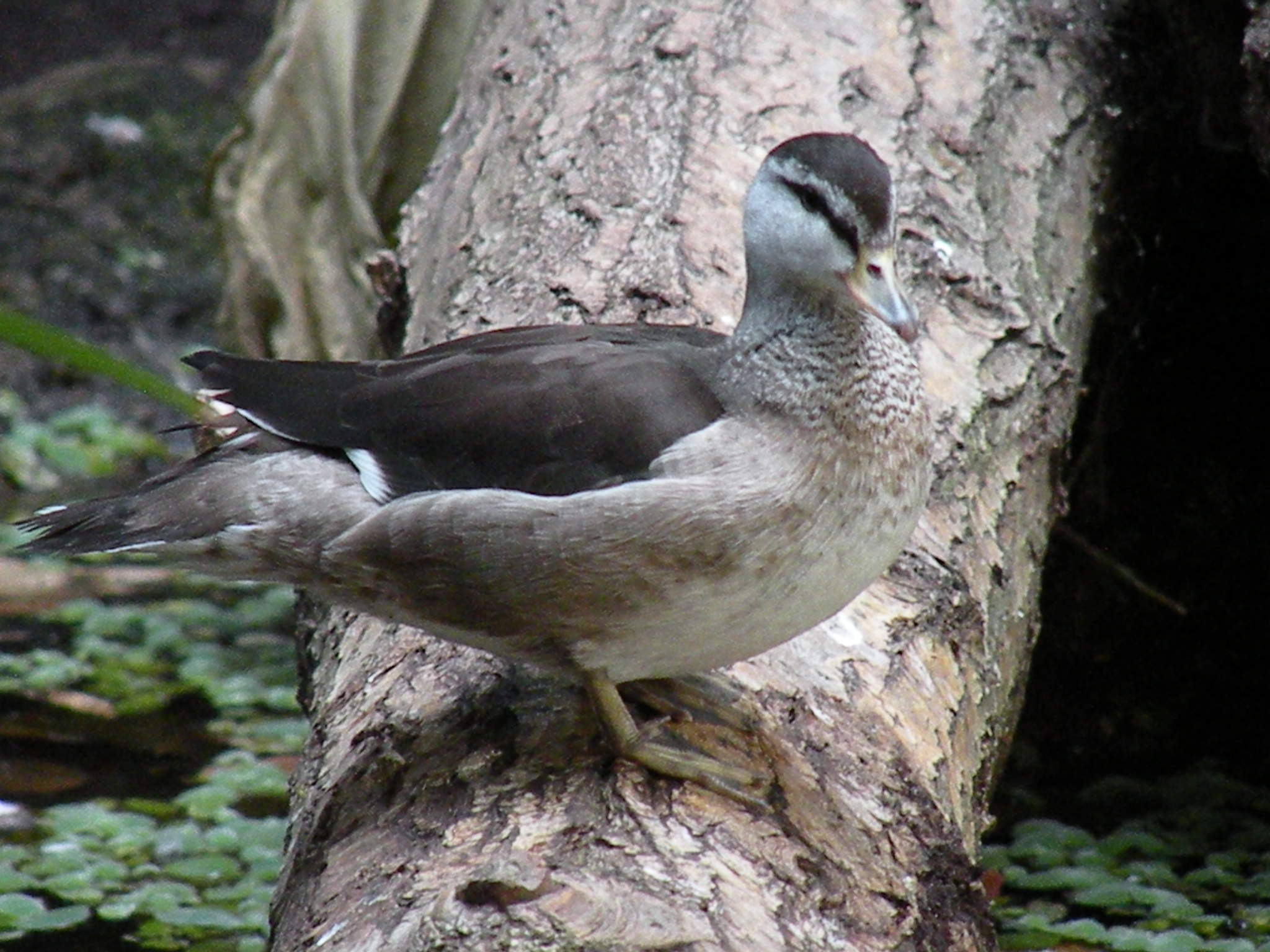 Cotton Pygmy Goose (Nettapus coromandelianus) in de Filipijnenhal van Avifauna, Alphen a/d Rijn, Nederland